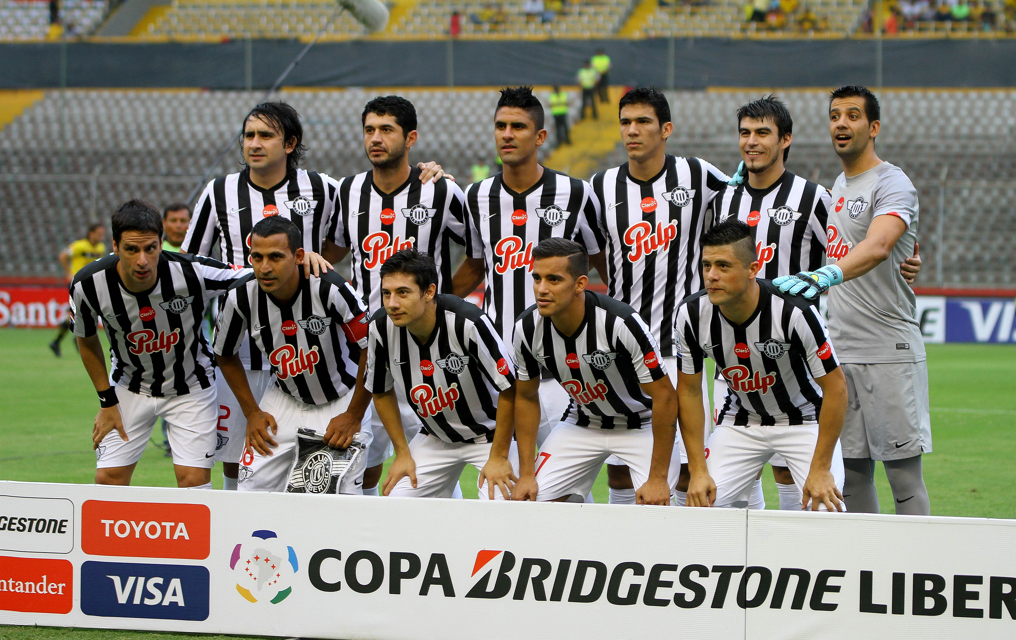 Guayaquil, Martes 3 de marzo del 2015 (ANDES).-Libertad de Paraguay enfrenta al Barcelona de Ecuador en el partido jugado en el estadio Monumental por Copa Libertadores Foto:César Muñoz/ANDES